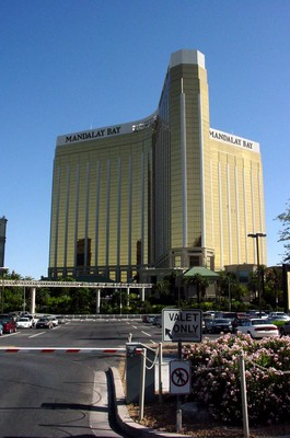 Mandalay Bay